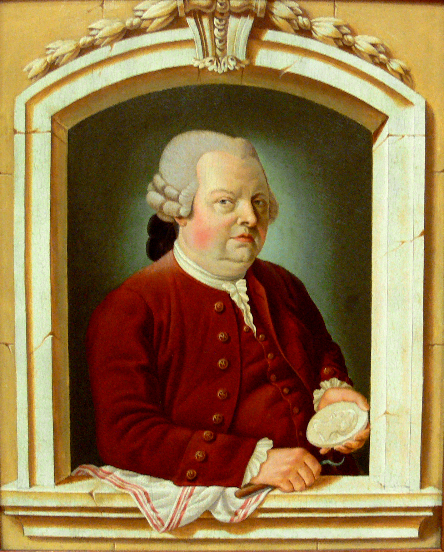 Bildnis eines Porzellanbossierers (mit Reliefmedaillon und Bossierstichel), um 1800 Laut Beschriftung: Bildnis des Adam Clair (1763–1829), 1776–1799 tätig an der Frankenthaler Manufaktur